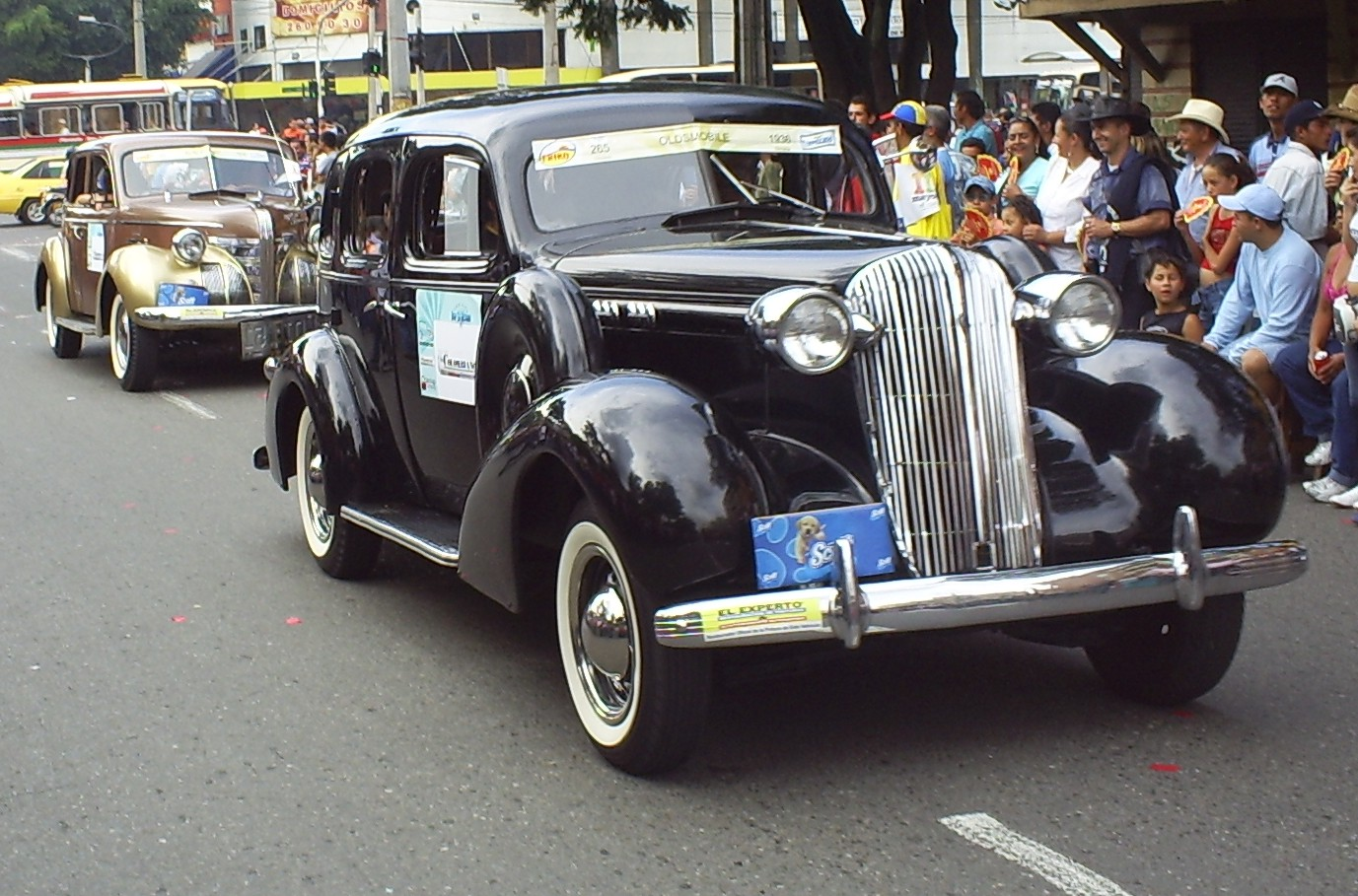 Desfile de Autos Clásicos y Antiguos en la Feria de las Flores, Medellín, Colombia